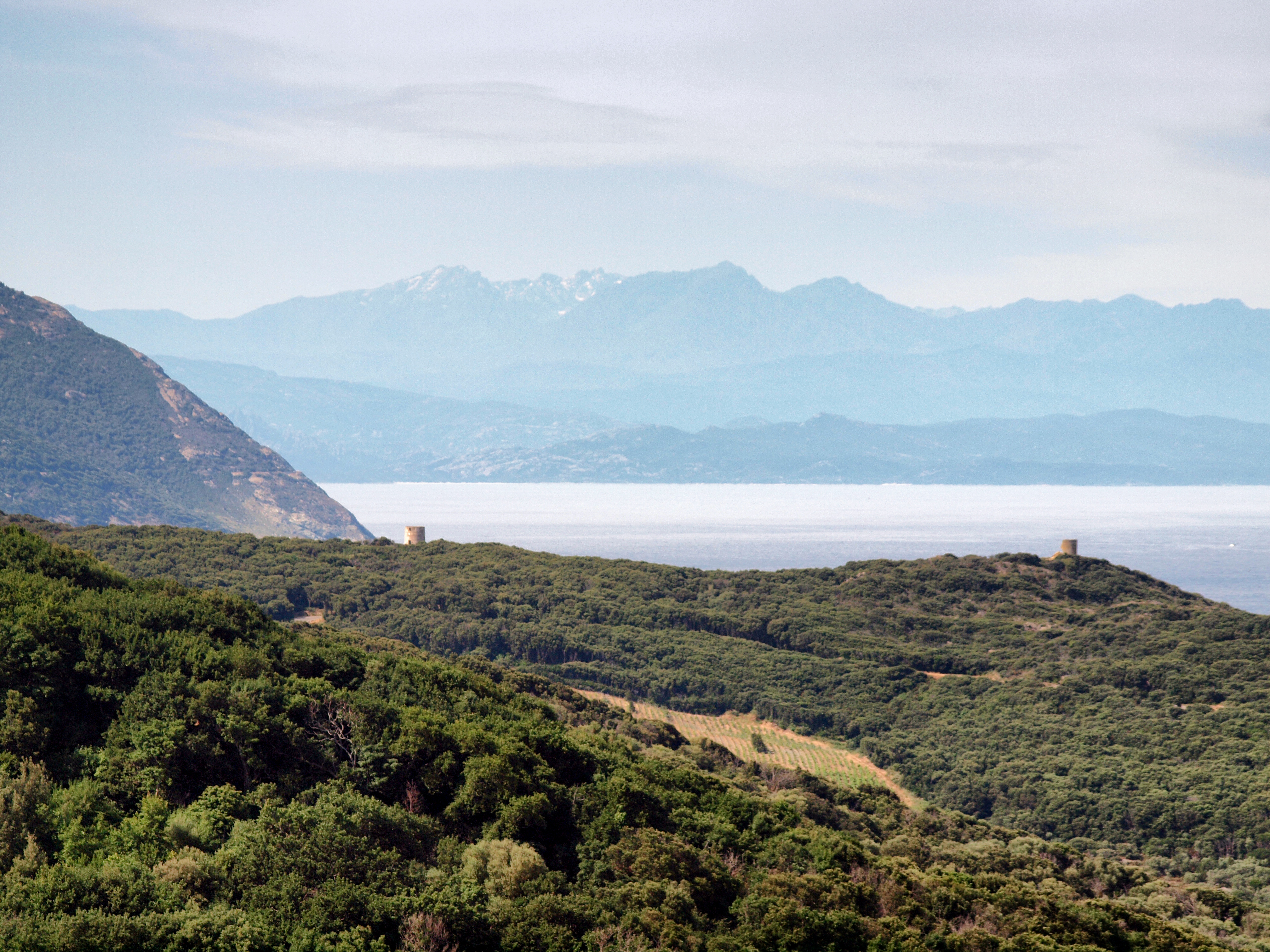 Morsiglia, Cap Corse - Anciens moulins à vent au lieu-dit Monte Rossu